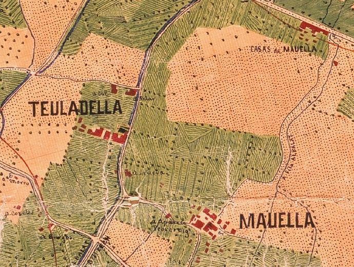 Mauella i Tauladella el 1883 (el nord està a la dreta).